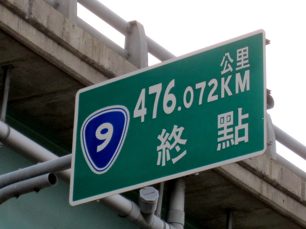 中文（台灣）: 台九線是台灣最長的公路，從北到南貫穿東部各縣市。